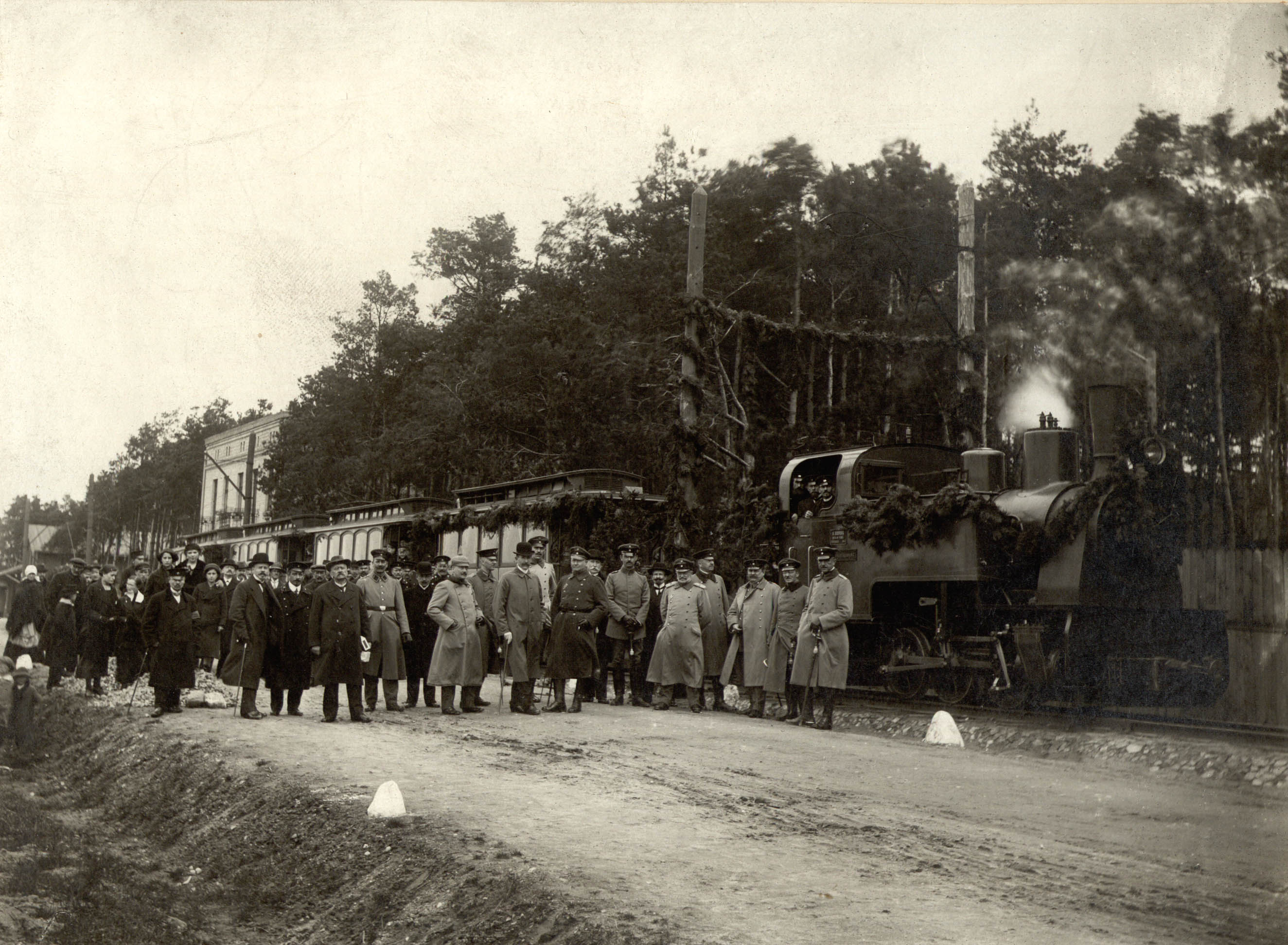 Uroczystość otwarcia linii kolejki dojazdowej Łódzkich Wąskotorowych Elektrycznych Kolei Dojazdowych od Rudy Pabianickiej, przez Rzgów do Tuszyna - 18 kwietnia 1916 r. (do 1 VI 1927 r. z trakcją parową, następnie elektryczna). Foto ze zbiorów własnych.